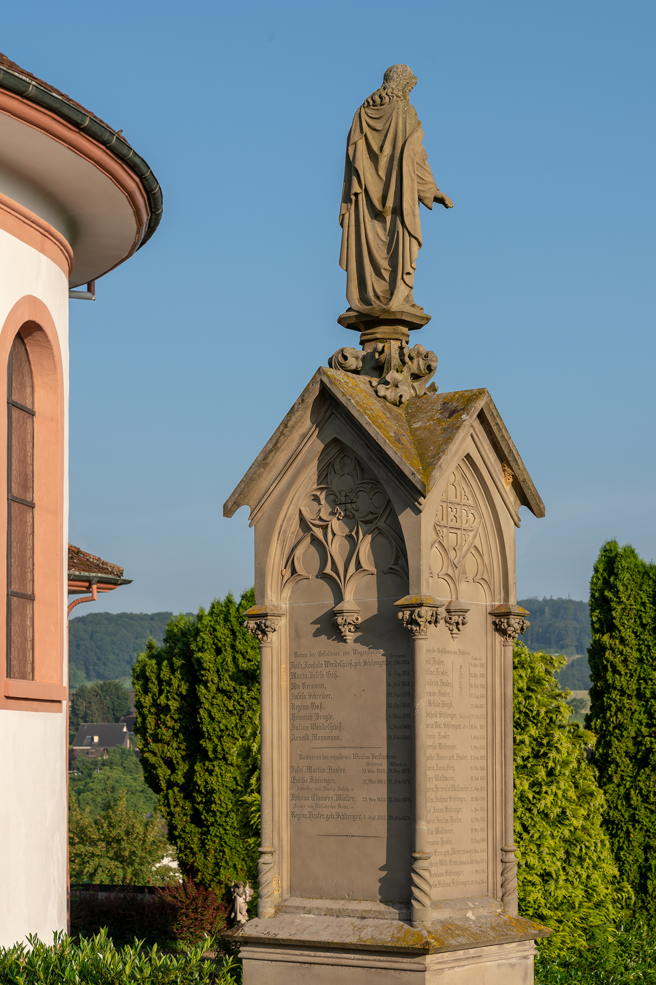 Denkmal auf dem Friedhof von Wegenstetten im Gedenken an die Todesopfer des Treppeneinsturzes im Schulhaus von Hellikon im Jahre 1875